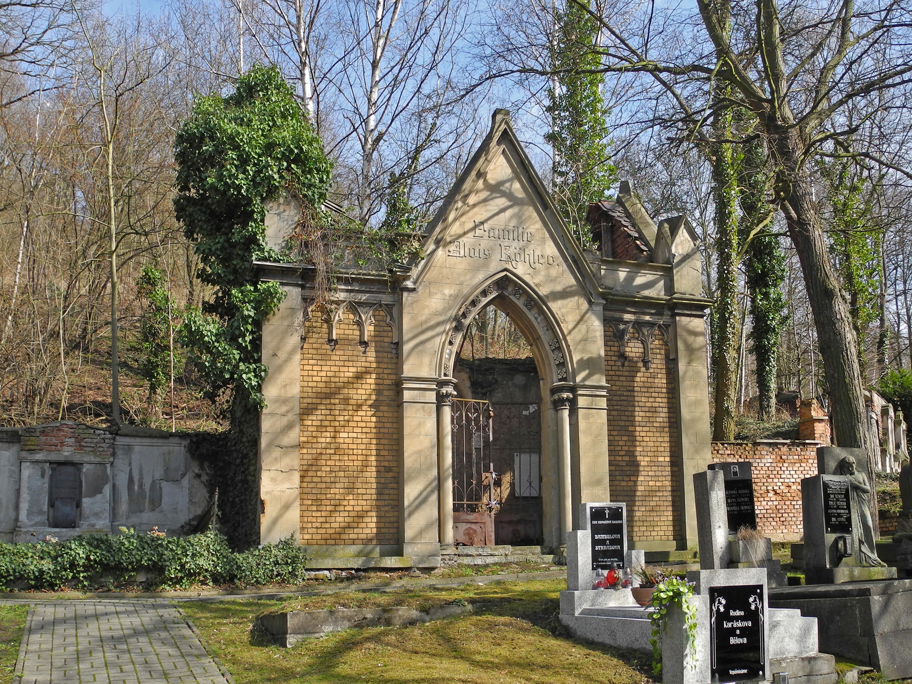 Friedhof in Aussig-Schönpriesen – Ústí nad Labem, Krásné Březno, Neštěmická. Ehem. Familiengruft Alois Köhler.